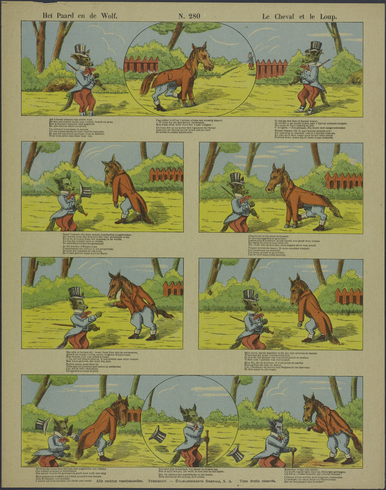 Centsprent met een litho, bestaande uit 4 rijen afbeeldingen in vrije vormgeving. Een aangeklede wolf wil een eveneens aangekleed paard te pakken krijgen om op te eten. De wolf doet zich voor als dokter, maar het paard heeft hem door en geeft hem een trap. Bevat rijmende onderschriften in Nederlands en Frans.